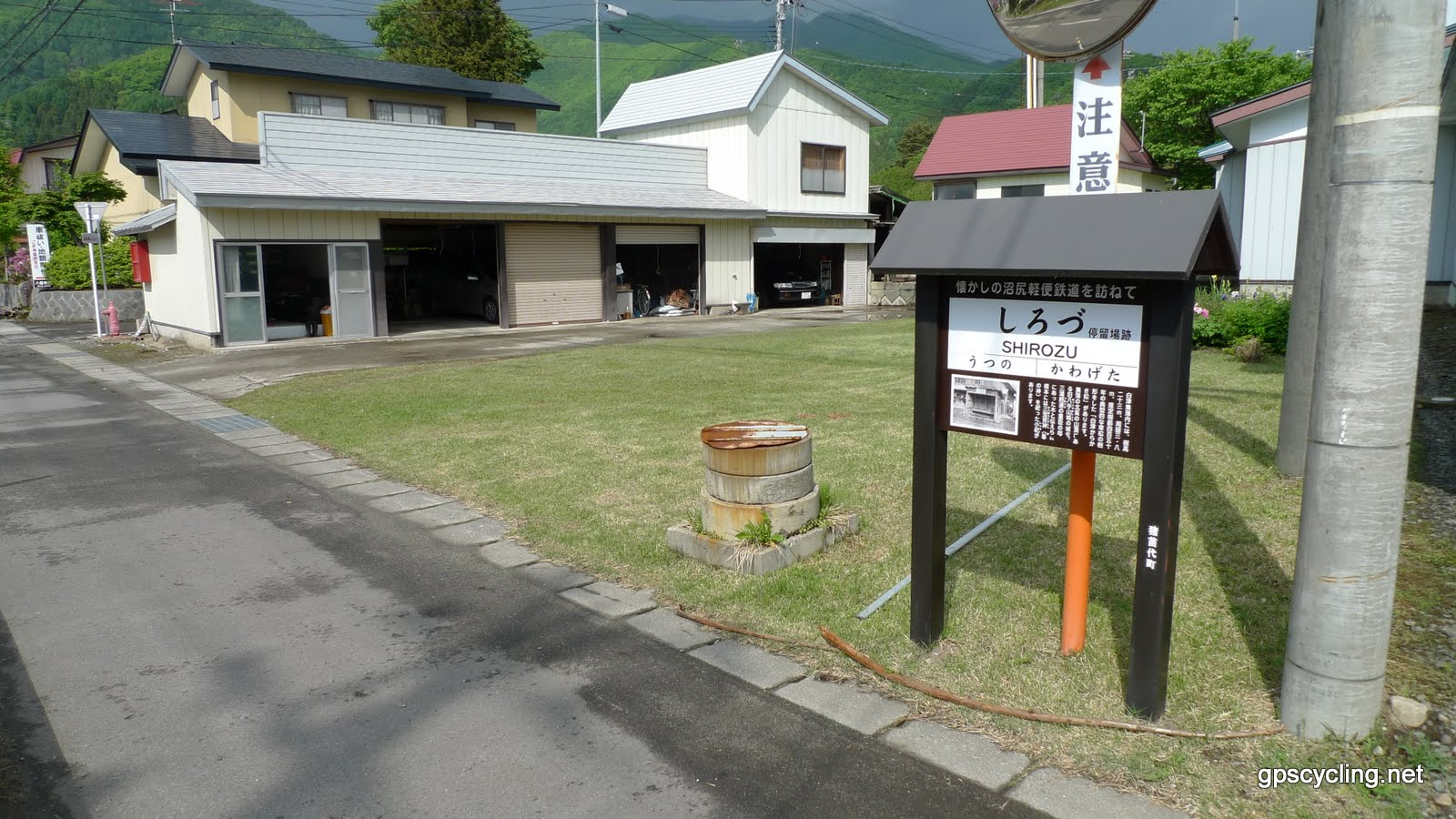 沼尻鉄道白津駅跡